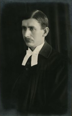 Hermann Johannes Ederberg